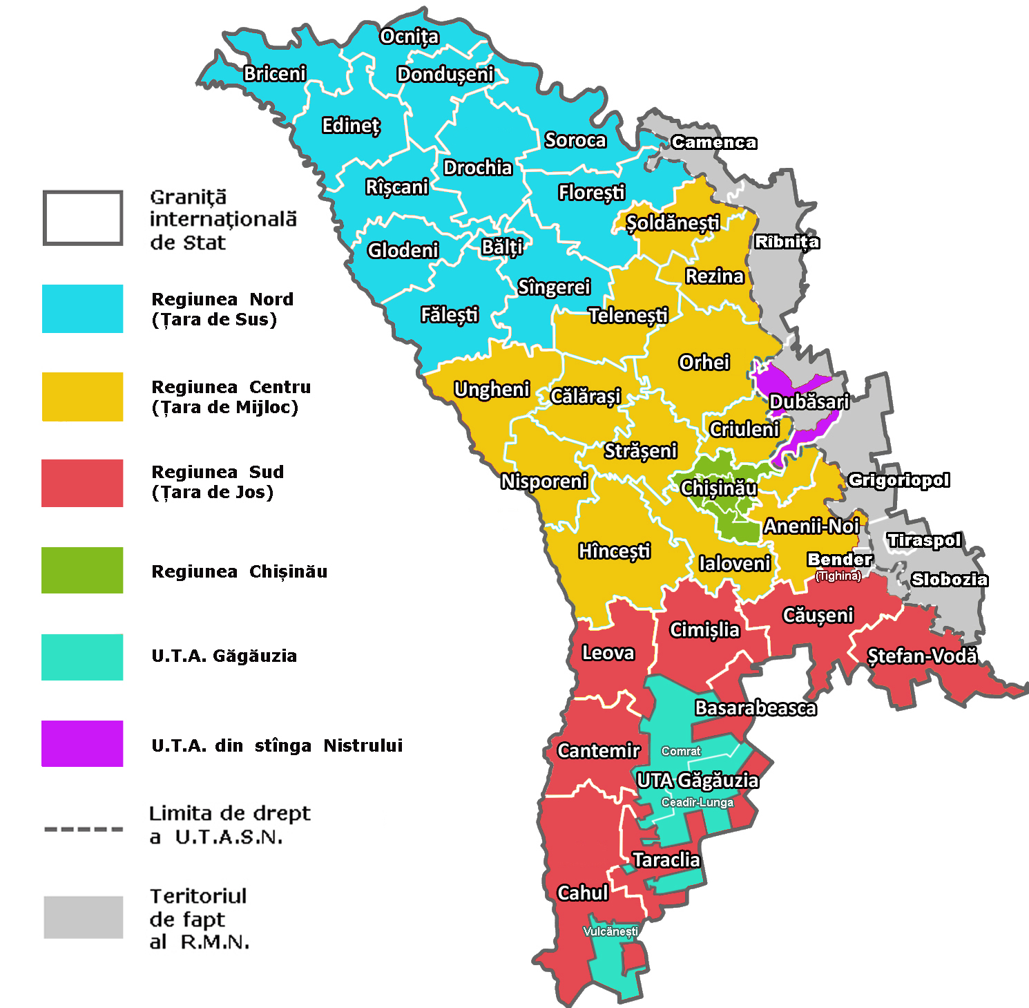 Organizarea administrativă a Republicii Moldova cu Regiunile de dezvoltare